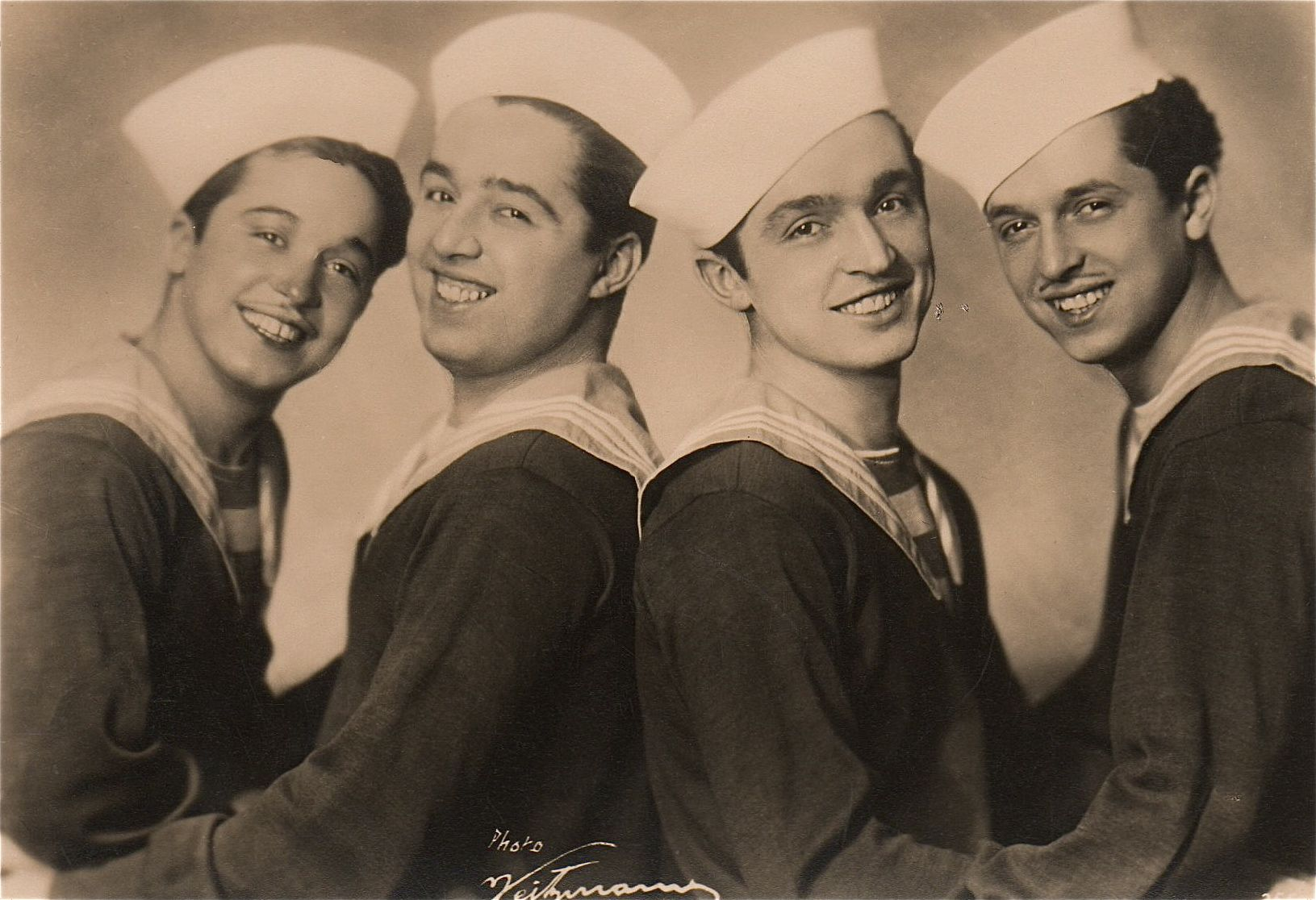 Les quatre frères